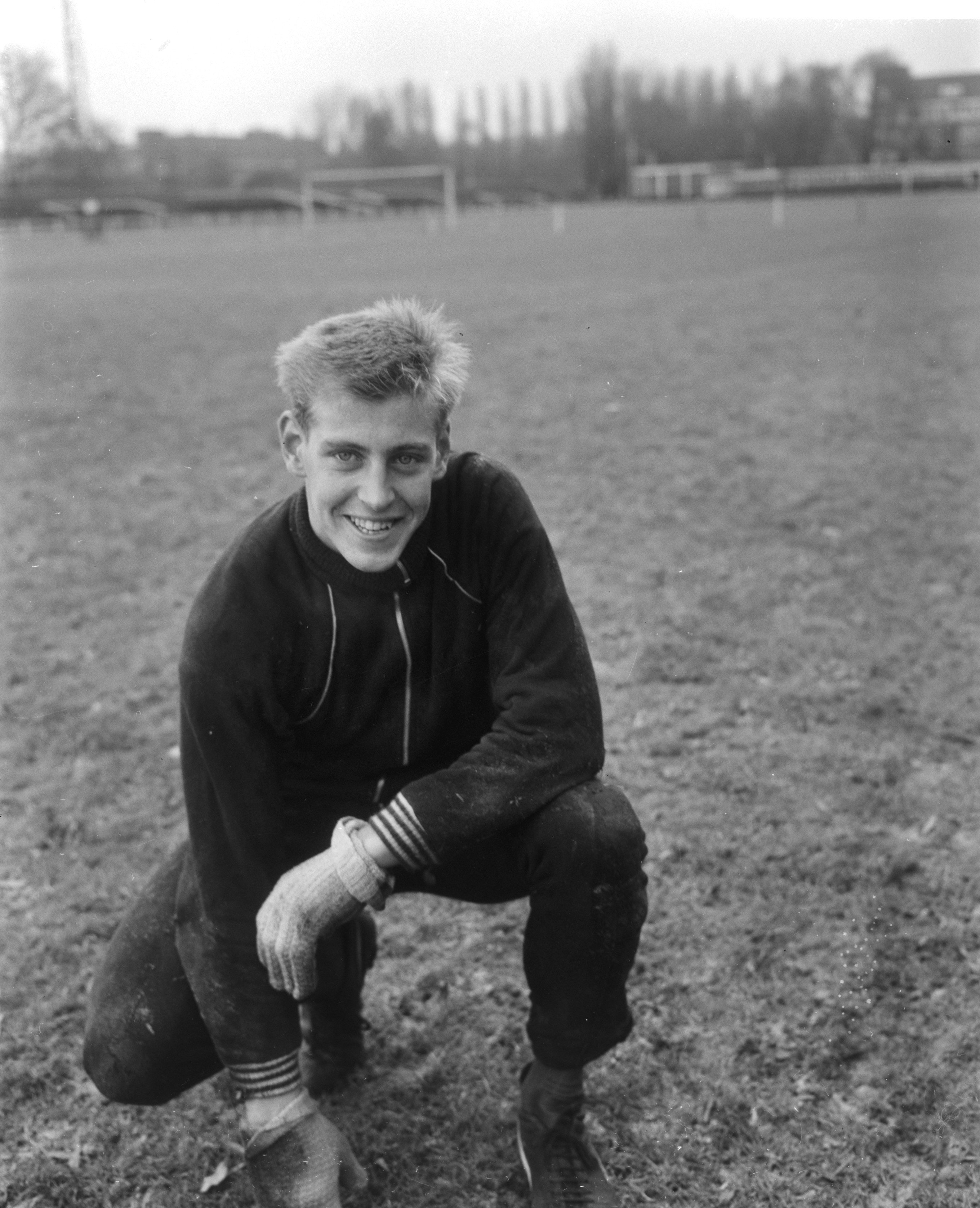 Collectie / Archief : Fotocollectie Anefo Reportage / Serie : Piet Schrijvers, de reservekeeper van voetbalclub DWS Beschrijving : sport, voetbal Datum : 3 november 1965 Locatie : Amsterdam, Noord-Holland Trefwoorden : sport, voetbal Persoonsnaam : Schrijvers, Piet Fotograaf : Bilsen, Joop van / Anefo Auteursrechthebbende : Nationaal Archief Materiaalsoort : Negatief (zwart/wit) Nummer archiefinventaris : bekijk toegang 2.24.01.04 Bestanddeelnummer : 918-3967